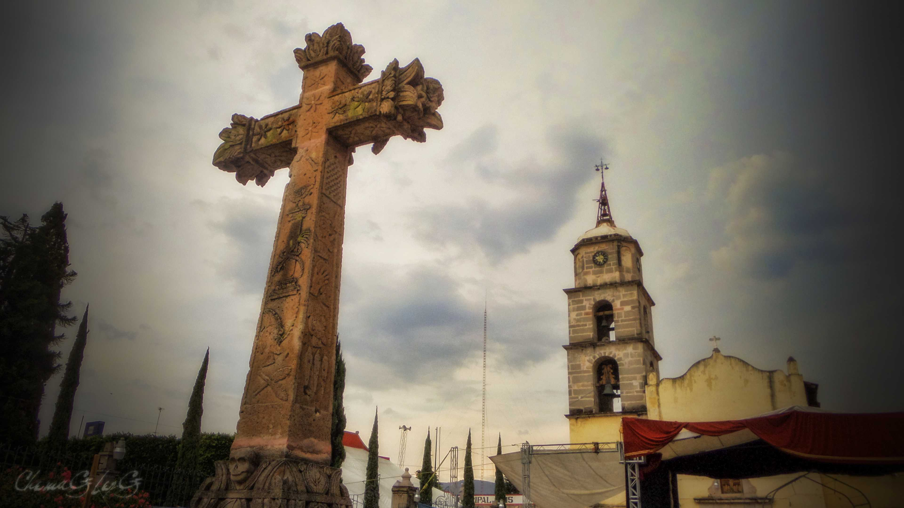 Cruz Atrial de cantera rosa al frente, Templo y antiguo Ex Convento de San Jerónimo durante la Semana Santa de 2014